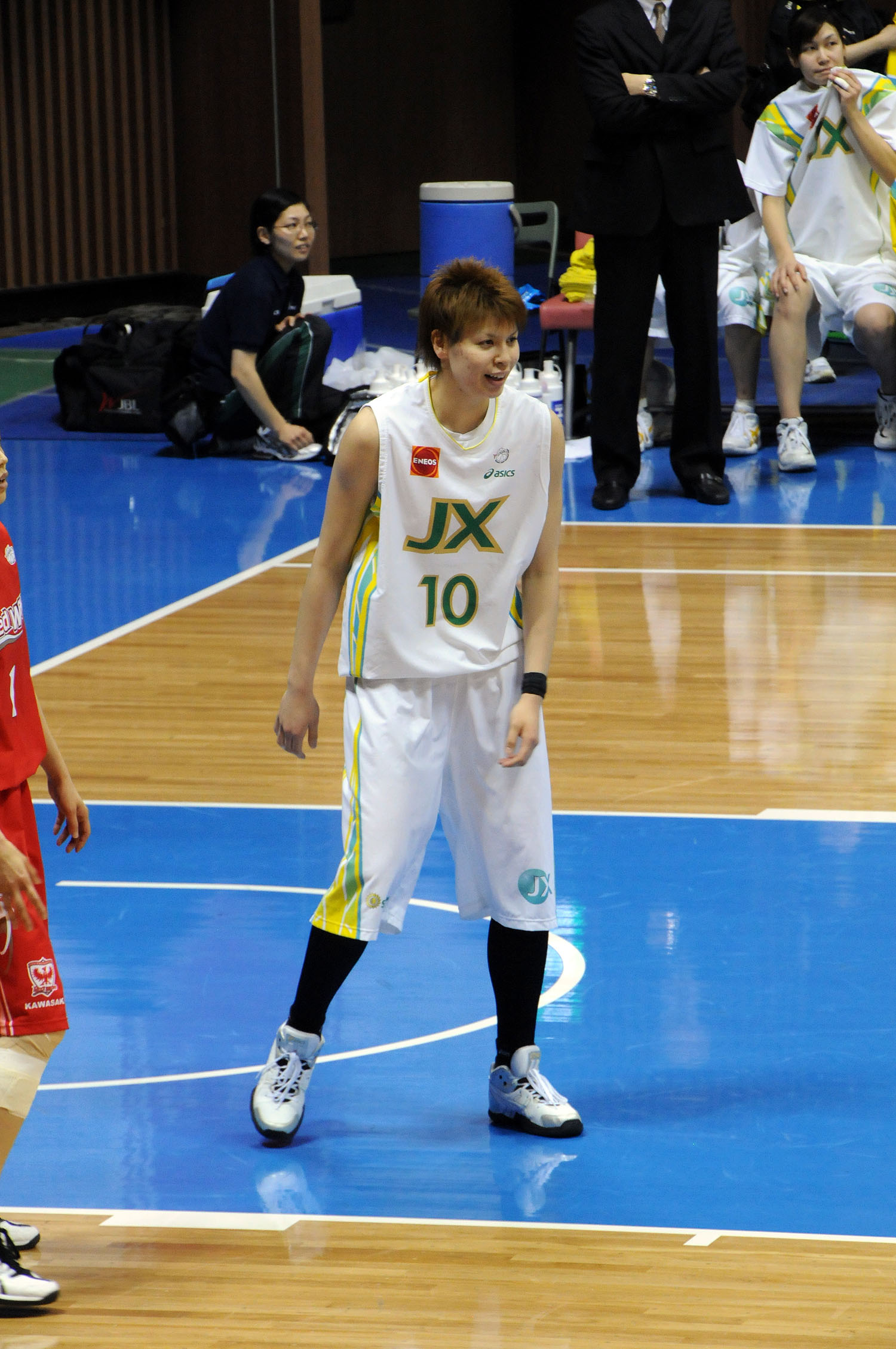 JXサンフラワーズ、渡嘉敷来夢選手。代々木第二体育館で。